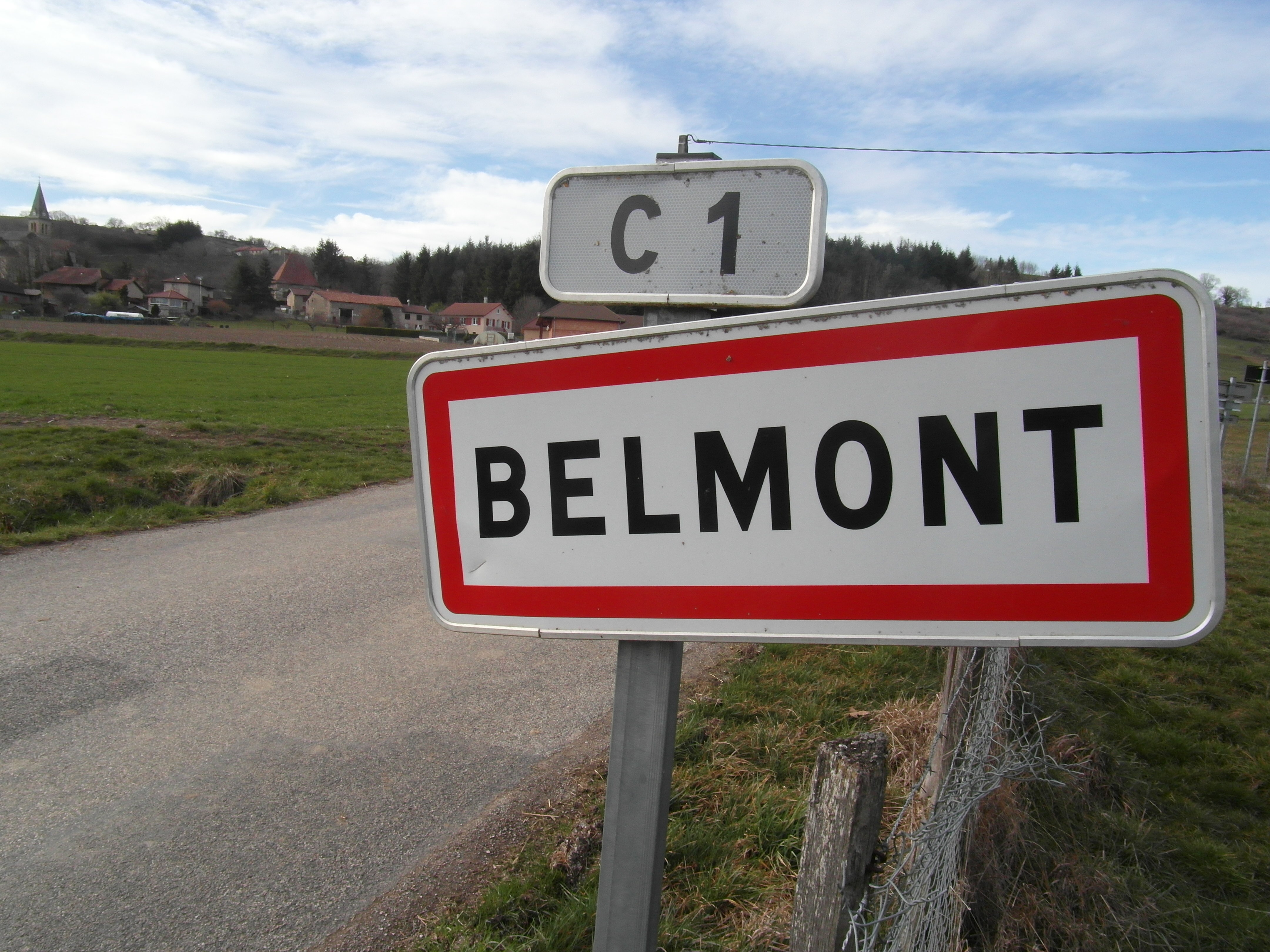 Panneau d'entrée à Belmont en mars 2019